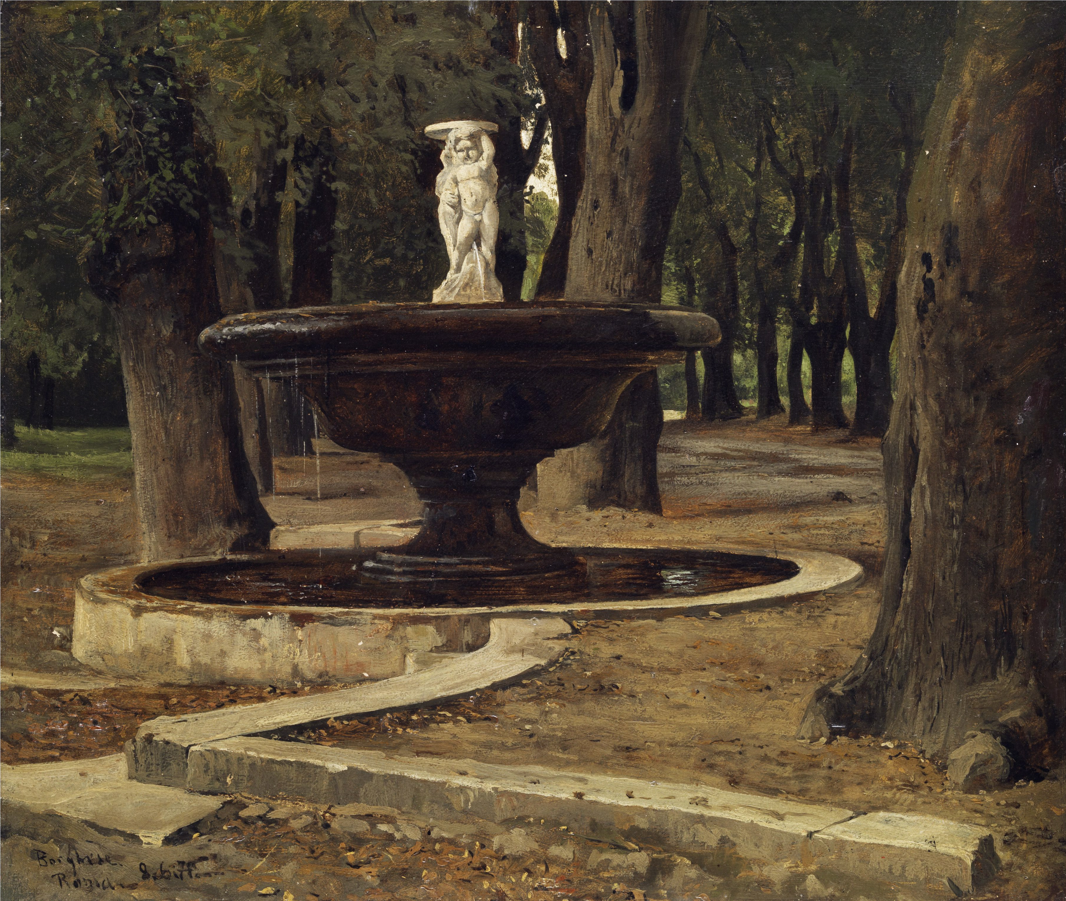 Brunnen im Park der Villa Borghese in Rom. „Borghese/ Roma 8. 6. (18)78". Öl auf Karton. 35,5 x 41,5.